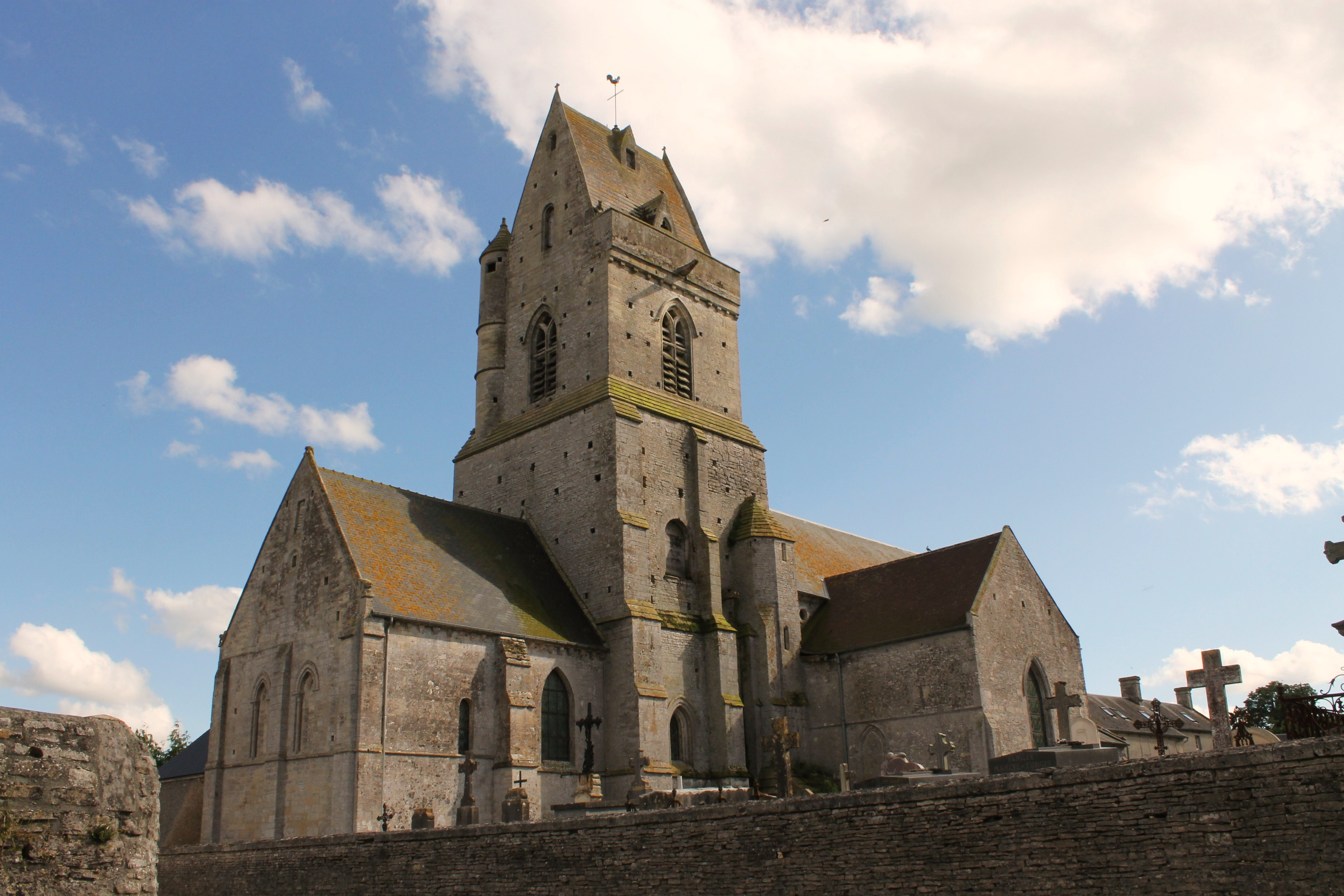 Église paroissiale Saint-Médard-et-Saint-Gildard (XIIe - XIXe siècles) à Crépon (Calvados)